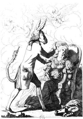 Dessin humoristique représentant un charlatan mesmérien